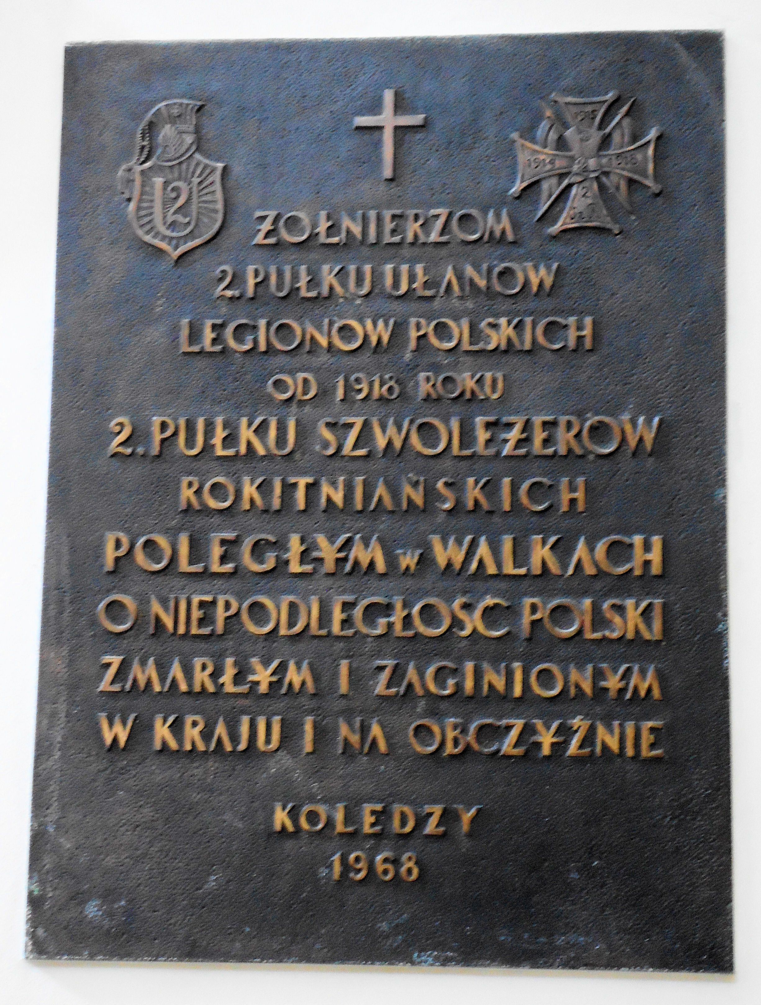 Tablica pamiątkowa żołnierzy 2 Pułku Szwoleżerów Rokitniańskich w Bazylice Św. Krzyża w Warszawie przy ul. Krakowskie Przedmieście 3